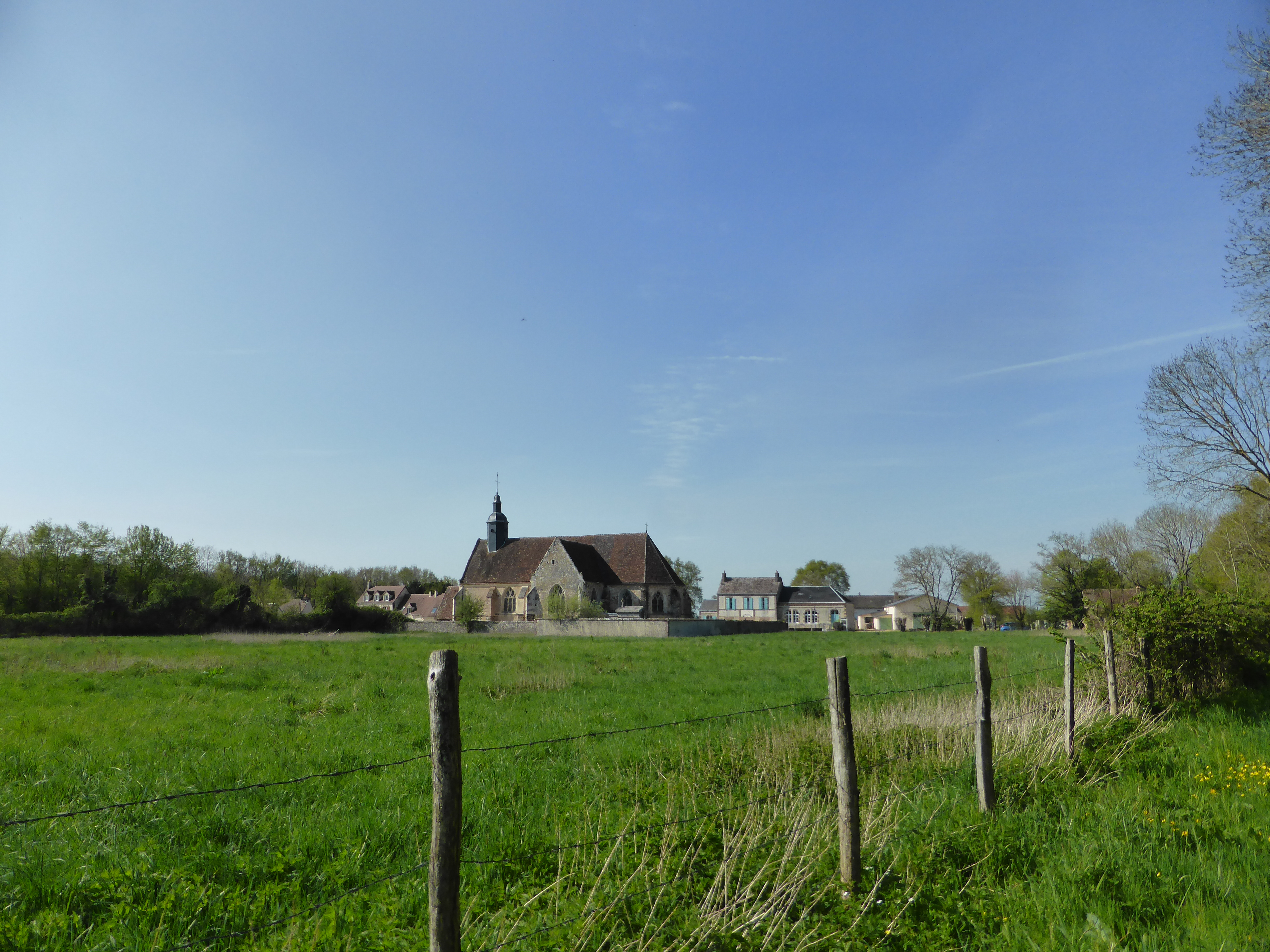 Vue du village de , en Eure-et-Loir.